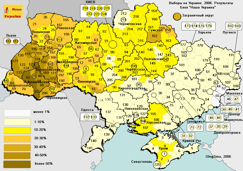 map